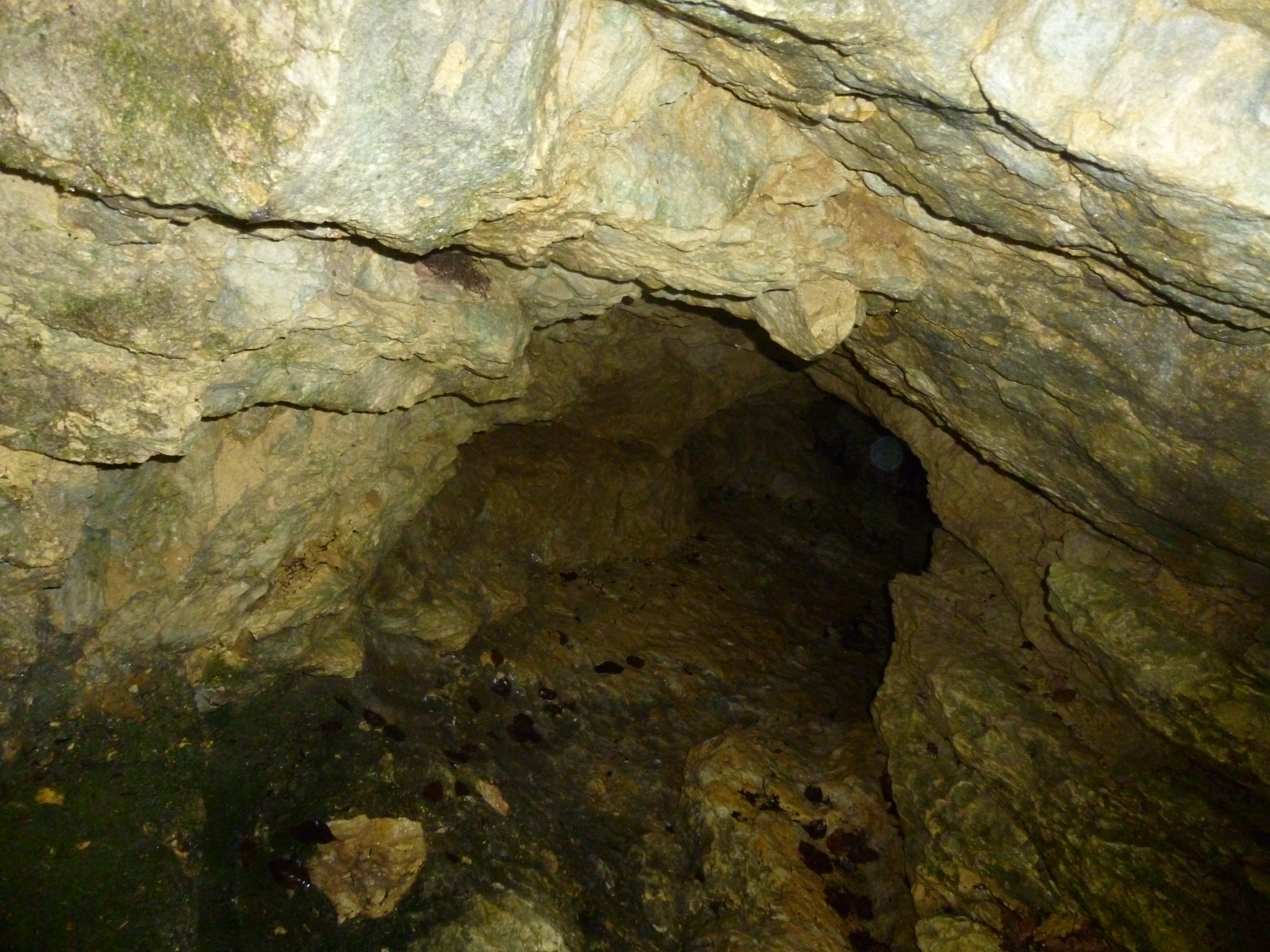 Entrée des Saints de Glace, entrée ouverte après désobstruction.